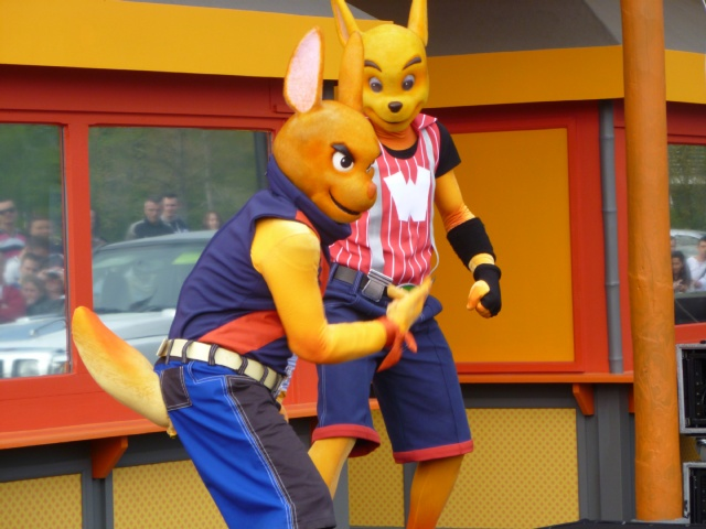 Walibi en squad tijdens de opening van Walibi Belgium in 2011